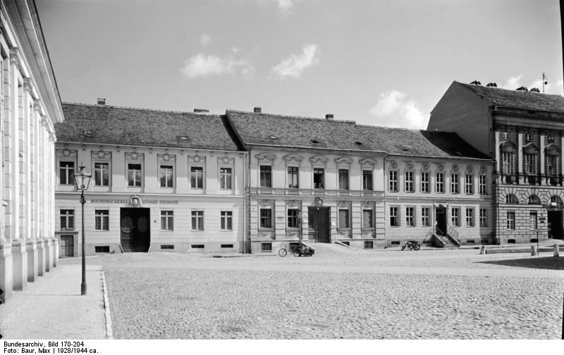 Potsdam.- Neuer Markt - Kutschstall